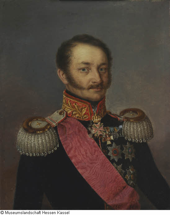 Fotografia di un ritratto del langravio Carlo I d'Assia-Philippsthal-Barchfeld